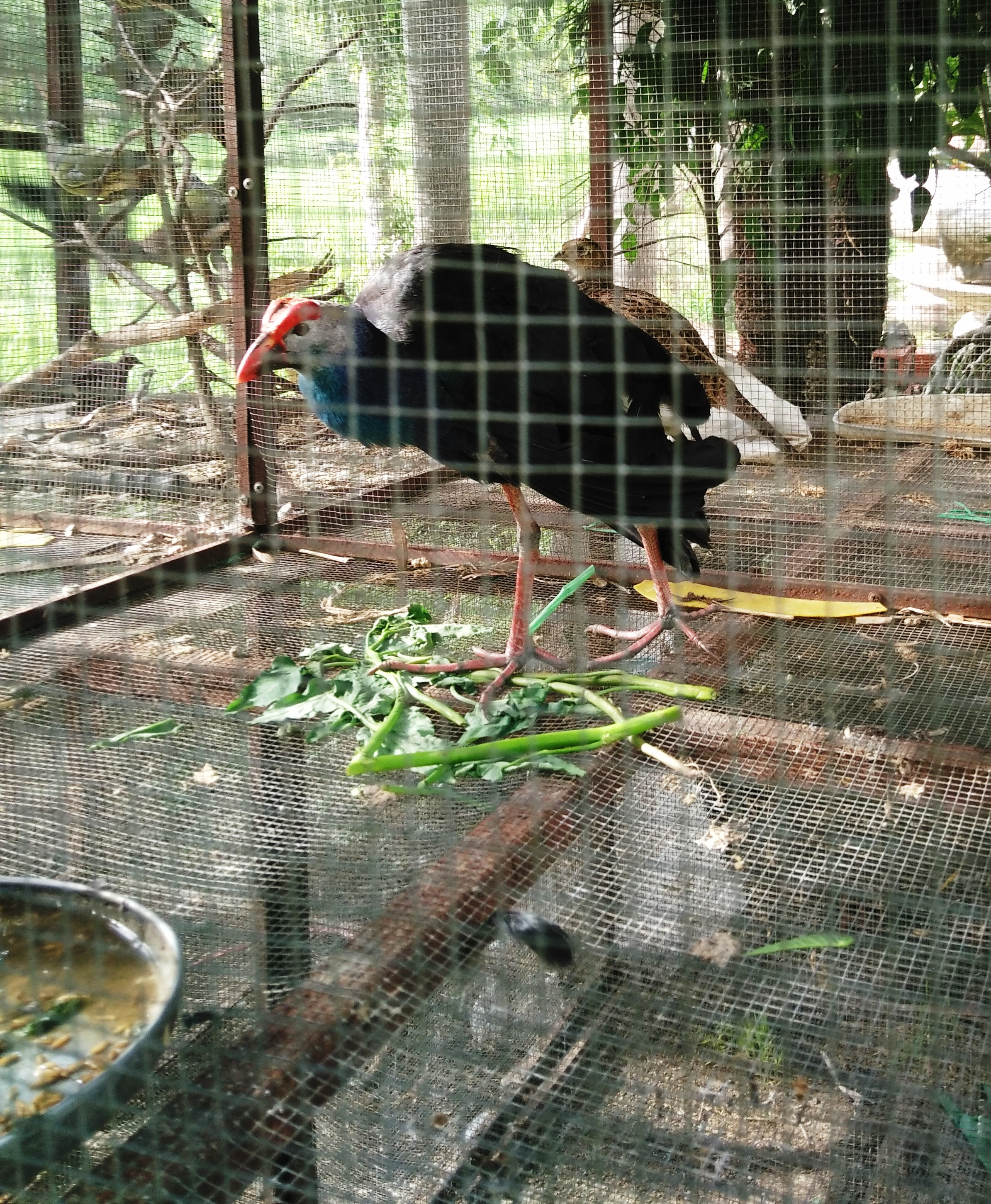 Hình chụp bằng di động về một con chim trích cồ được nuôi tại Củ Chi